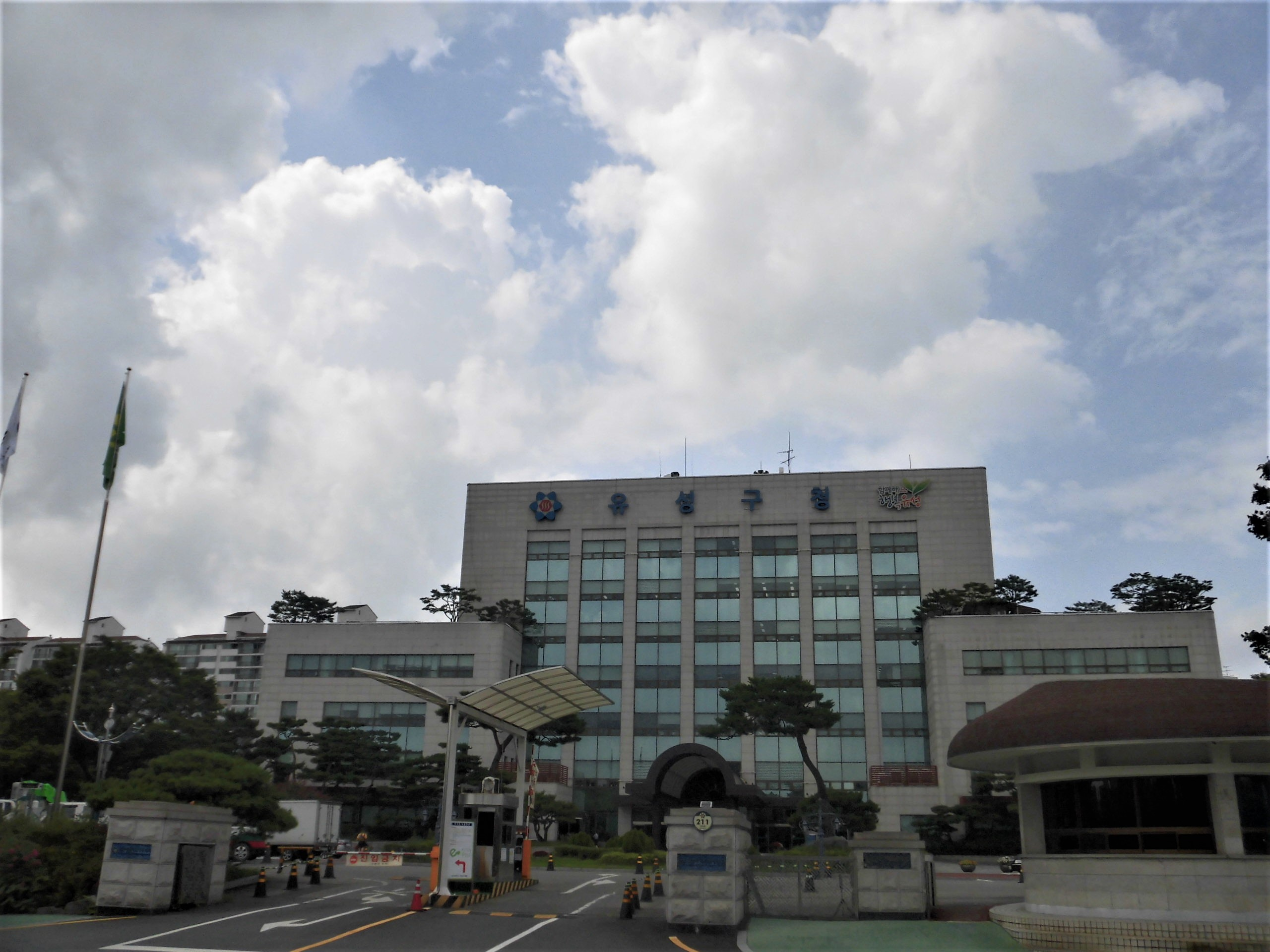 대전광역시 유성구에 있는 유성구청